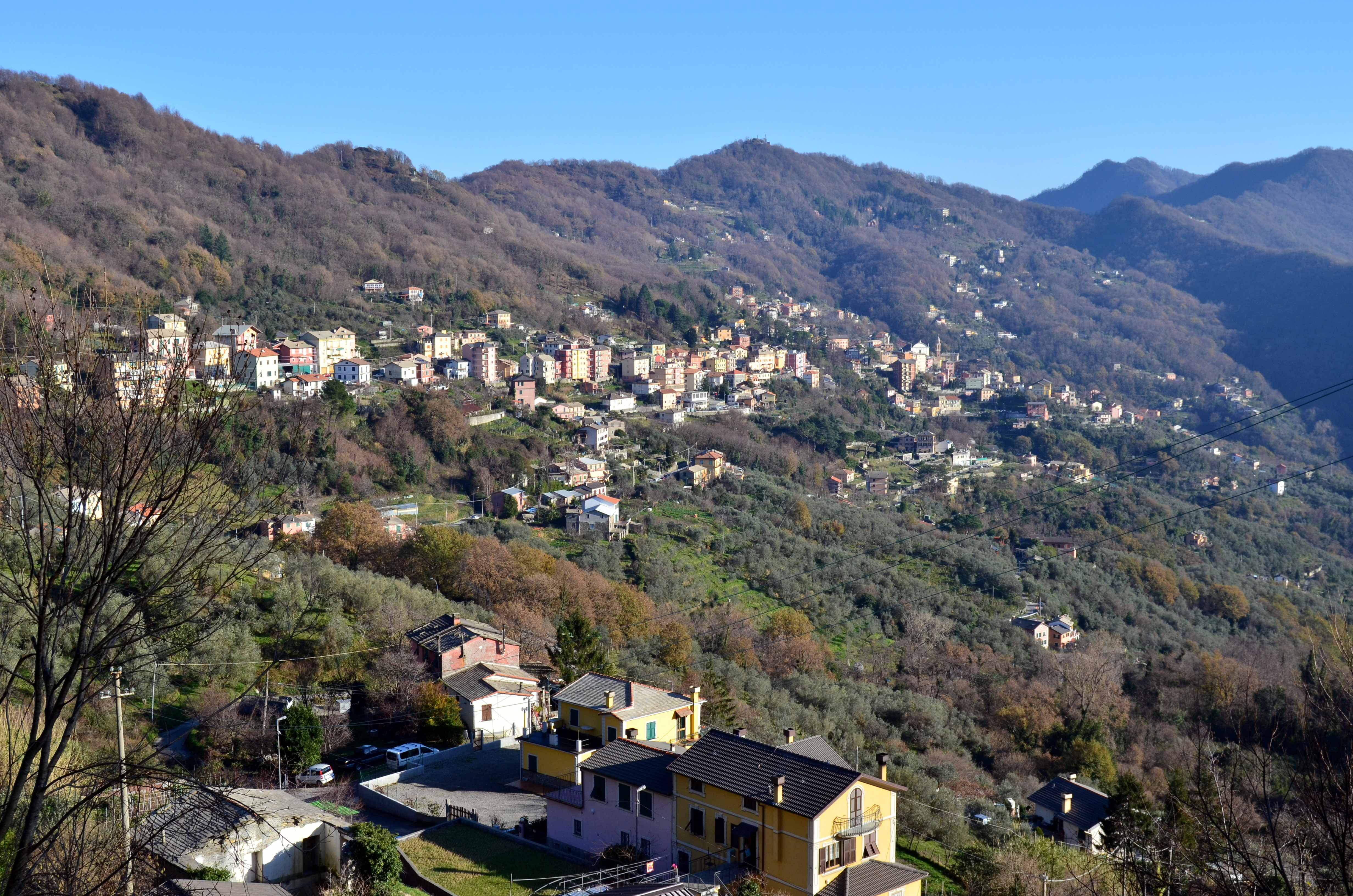 Panorama di Uscio, Liguria, Italia